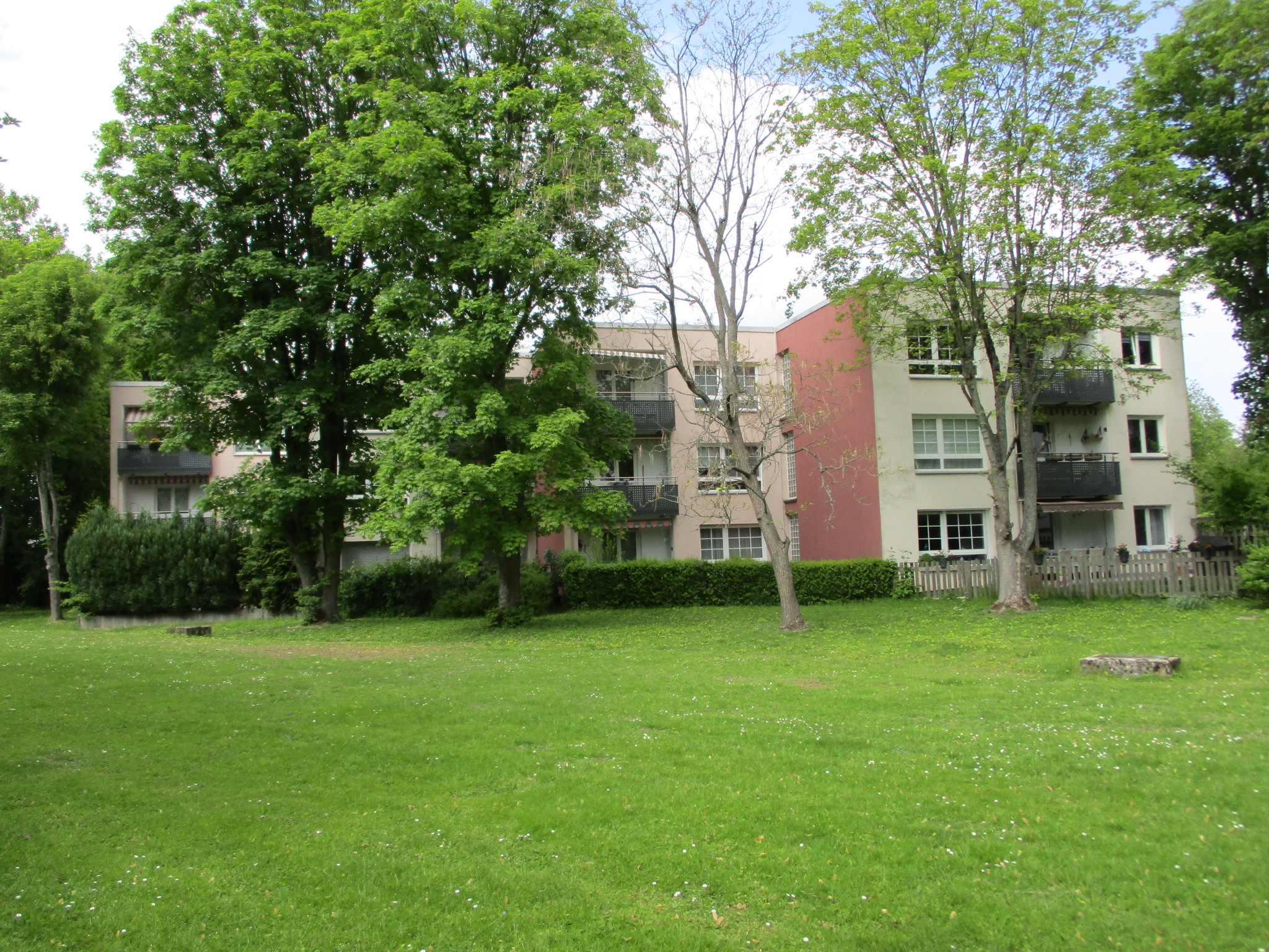 Martin-Luther-King-Park, Frankfurt am Main-Niederursel